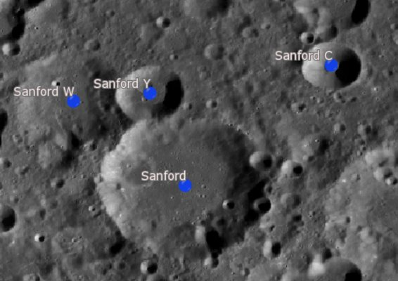 Cráter lunar Sanford. Cráteres satélite. (Imagen LRO)